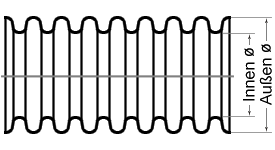 Zeichnung eines Wellschlauchs, selbst erstellt